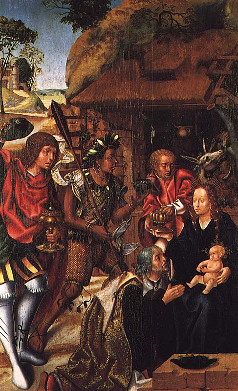 O quadro "Adoração dos Reis Magos", do pintor Vasco Fernandes, foi feito entre 1501 e 1506. Cabral seria o personagem ajoelhado. Talvez seja o seu único retrato verdadeiro. Esta imagem apareceu pela primeira vez no livro "Retratos e Elogios de Varões e Donas", editado em Lisboa em 1807. Impressa na antiga cédula brasileira de 1000 cruzeiros, tornou-se a face oficial de Pedro Álvares Cabral.